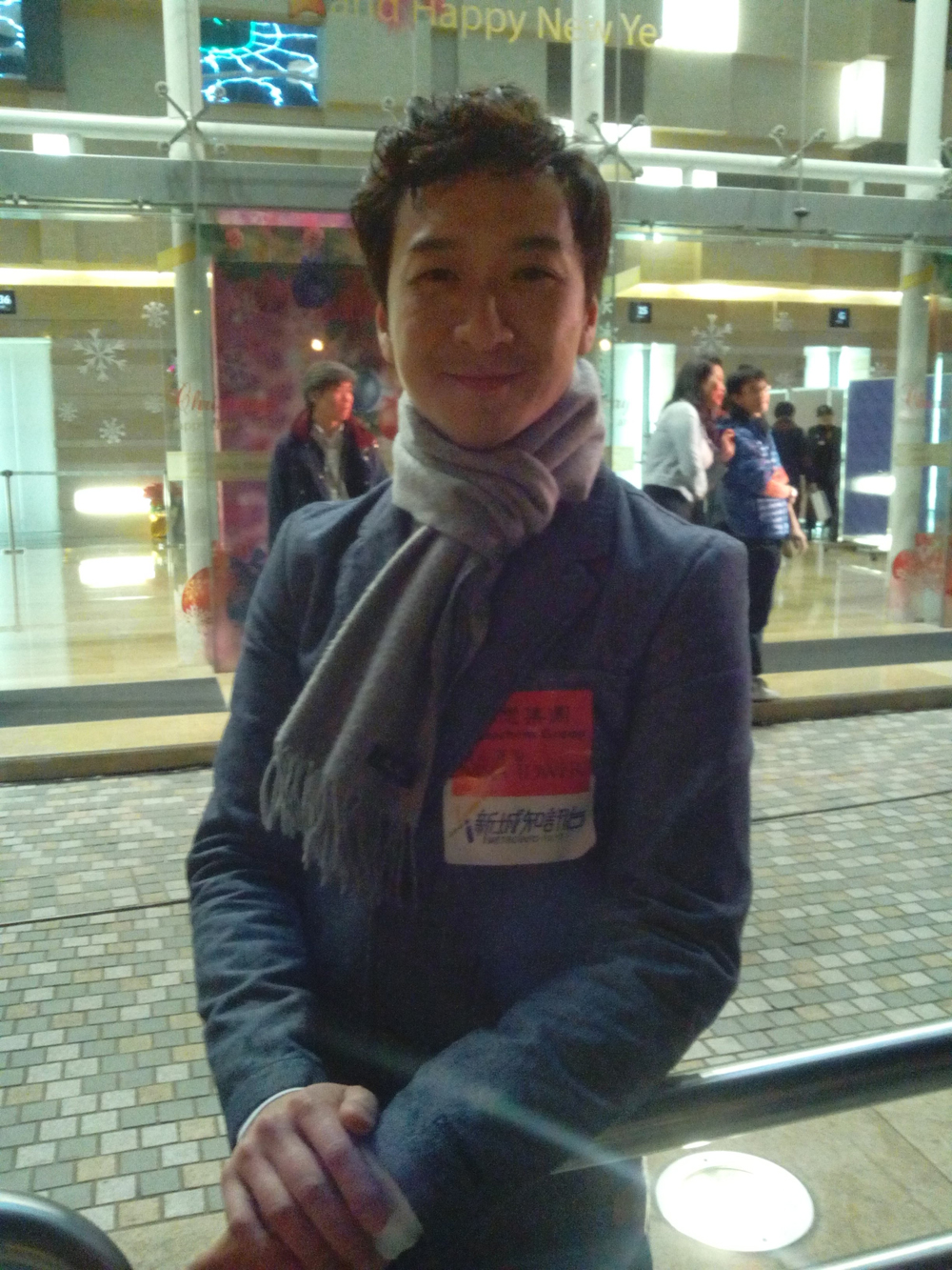 中文（香港）: (梁)焯皓的樣子